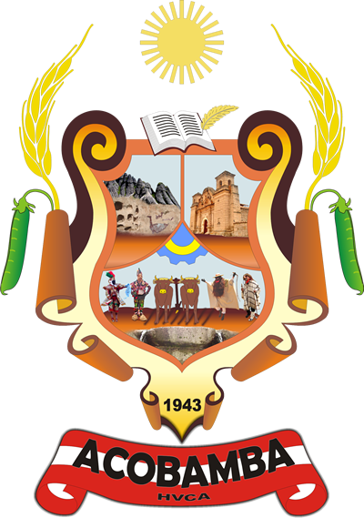 Provincia de Acobamba, Huancavelica